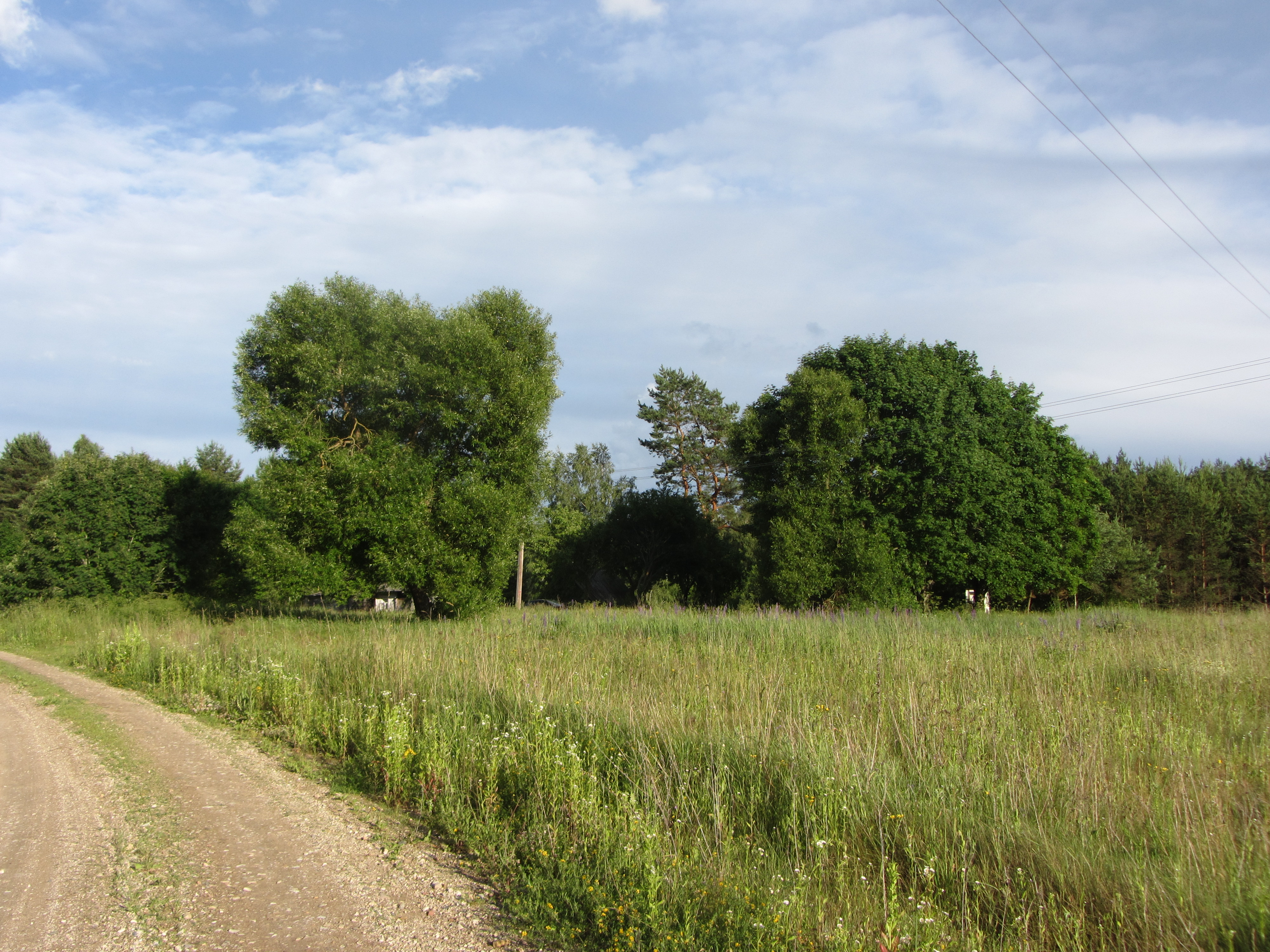 Baltamiškis 21367, Lithuania